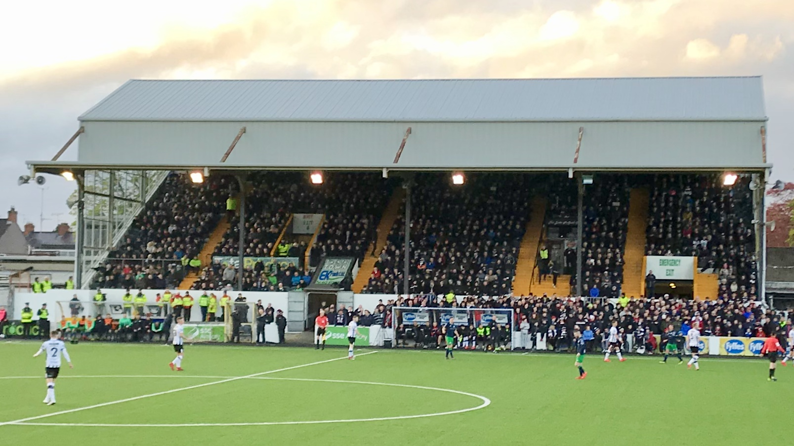 Oriel Park, Dundalk, Ireland, April 2019